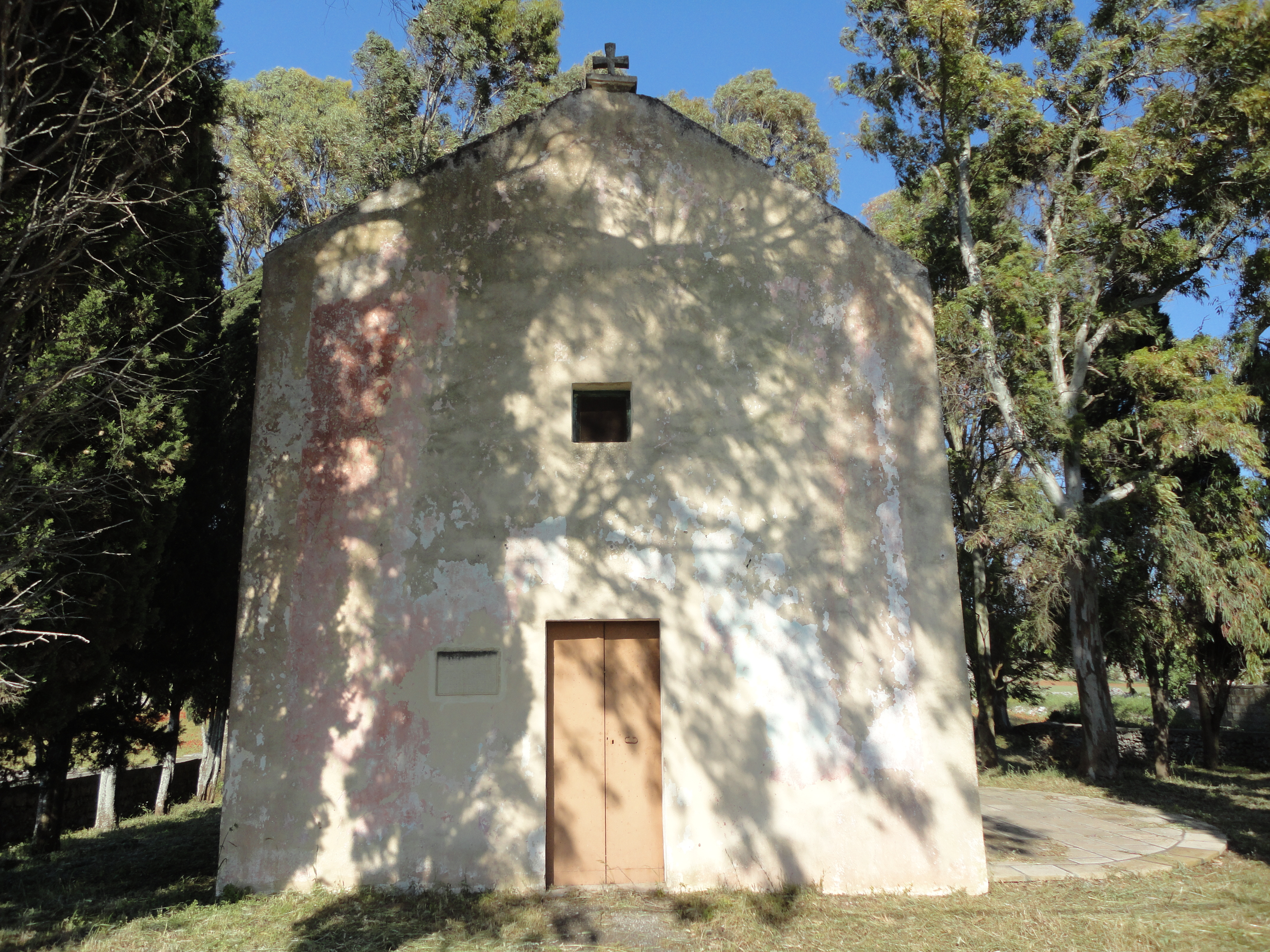 Chiesa di Sant'Elia Depressa, Lecce